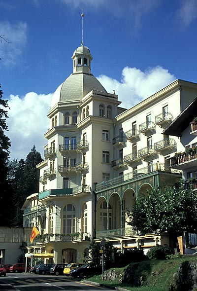 Maharishi European Research University, Seelisberg, Schweiz